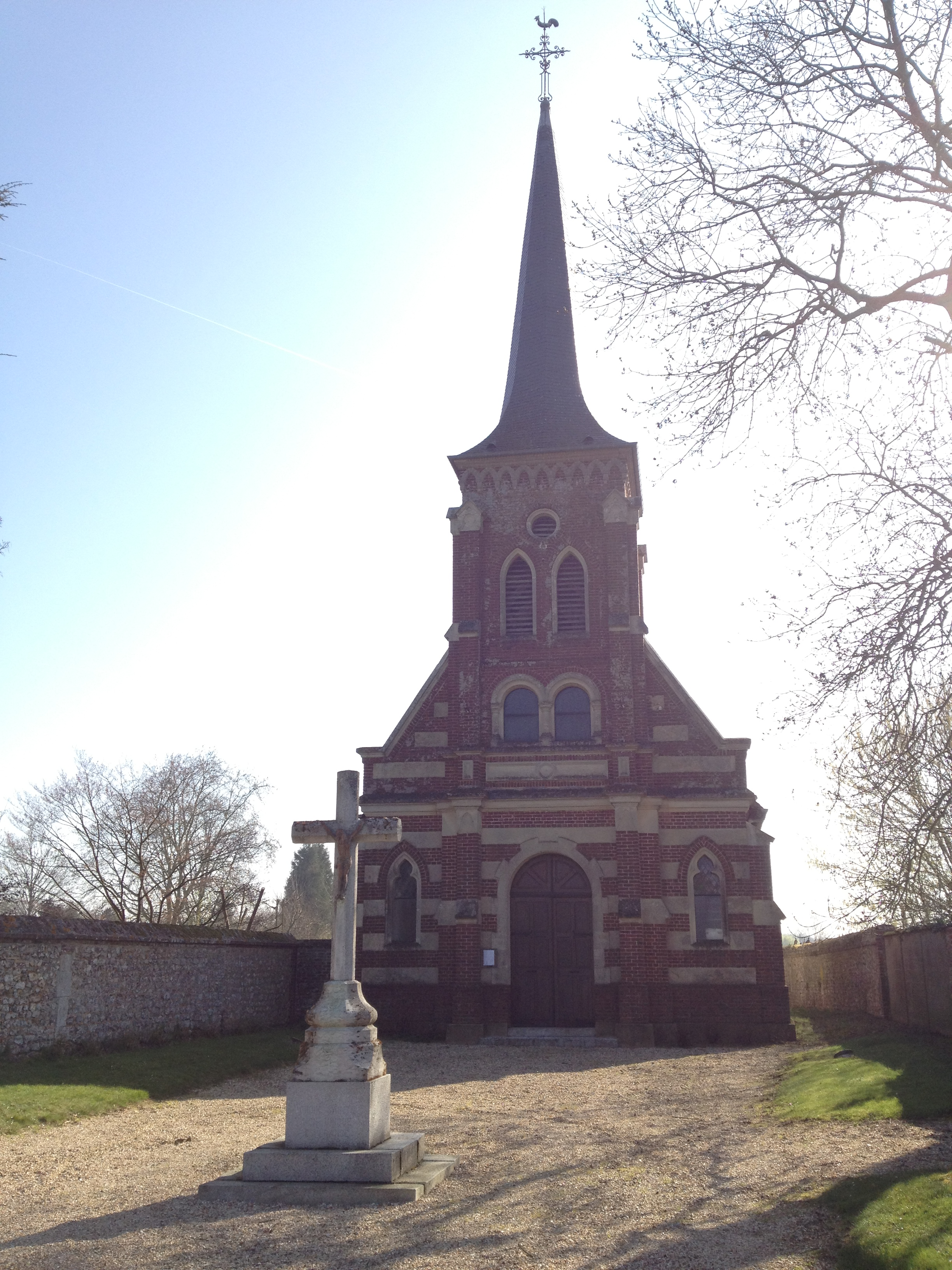 Église Saint-Christophe Marbeuf avec un calvaire sur la place.